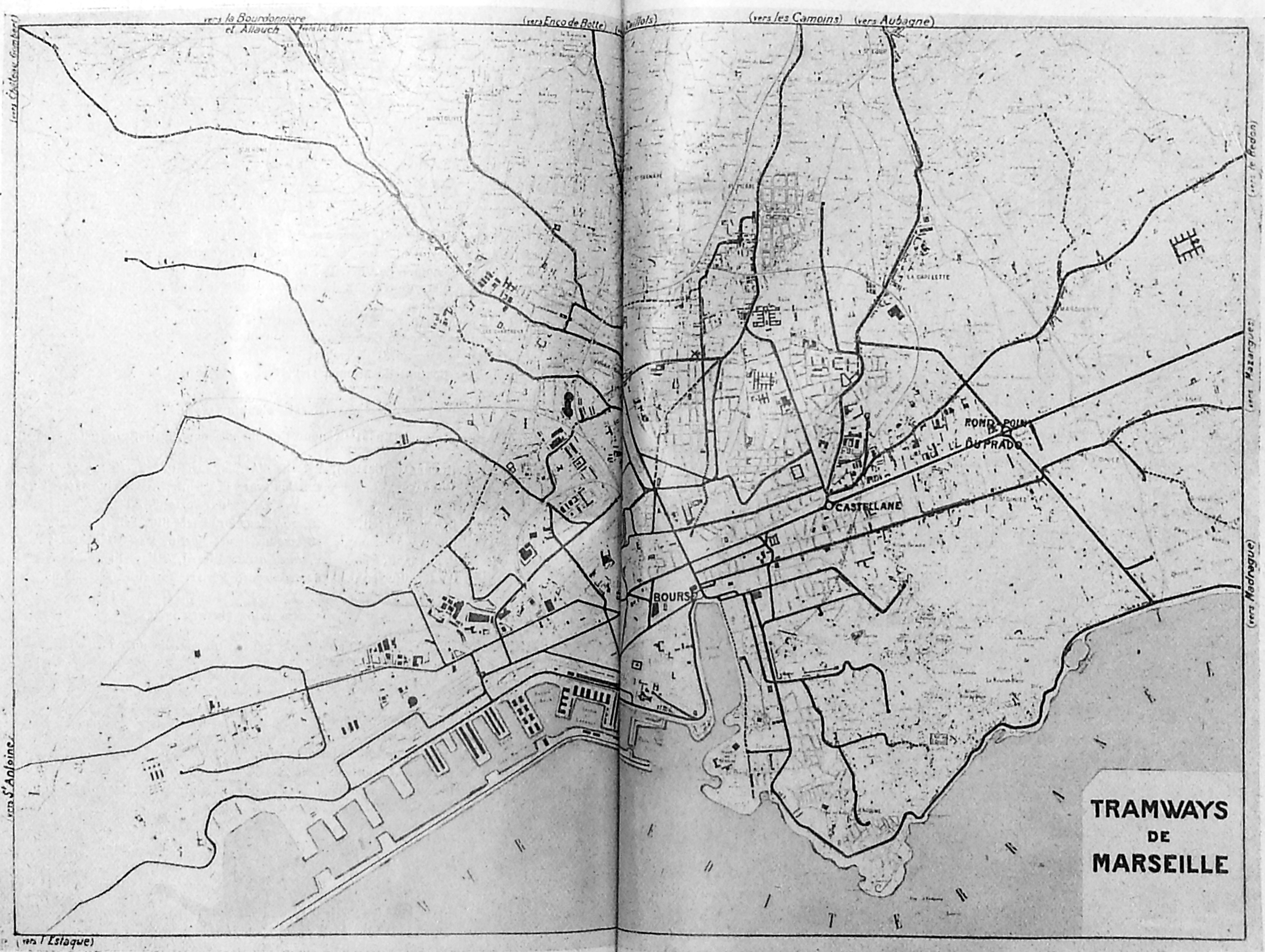 Plan du réseau de tramway de Marseille en 1928